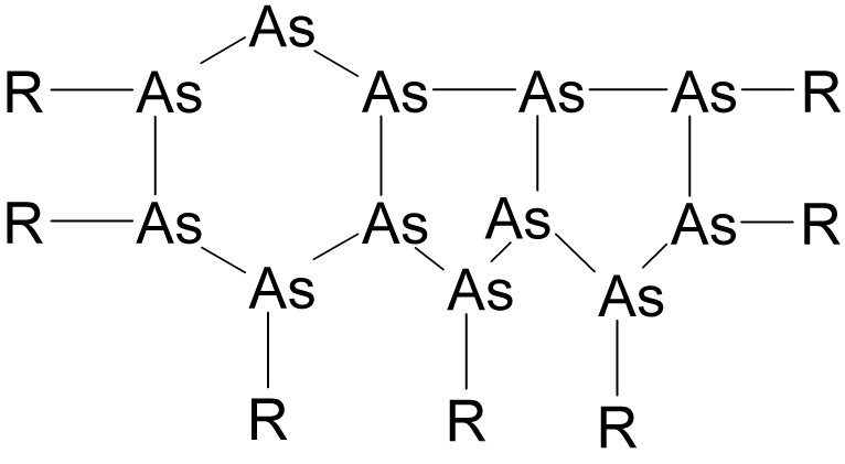 Chemische Struktur des "Polyziklischen Arsens", erstellt mit ISIS-Draw